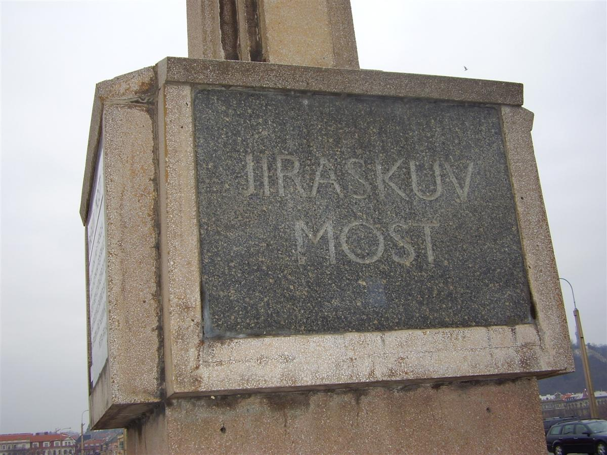 Jiráskův most v Praze, sloup se jménem mostu na straně u Tančícího domu